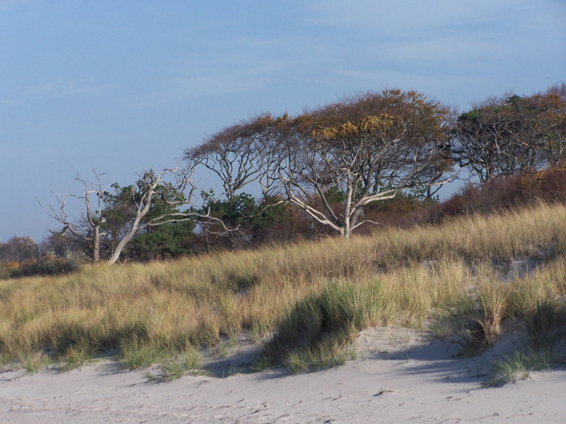 Rostocker Heide – Ostseeküste bei Rostock, Rosenort